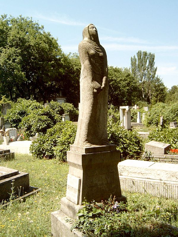 Móricz Zsigmondné Holics Janka (1905-1925), Móricz Gyöngyi (Bp., 1911. febr. 8. – Bp., 1979. jan. 5.) emlékiratíró, Móricz Zsigmond lánya, Simon Andor költő felesége és Simon Andor (Sajókaza, 1901. dec. 28. – Bp., 1986. júl. 8.)költő sírja Budapesten. Kerepesi temető: 34-9-35 [szobrász: Medgyessy Ferenc].